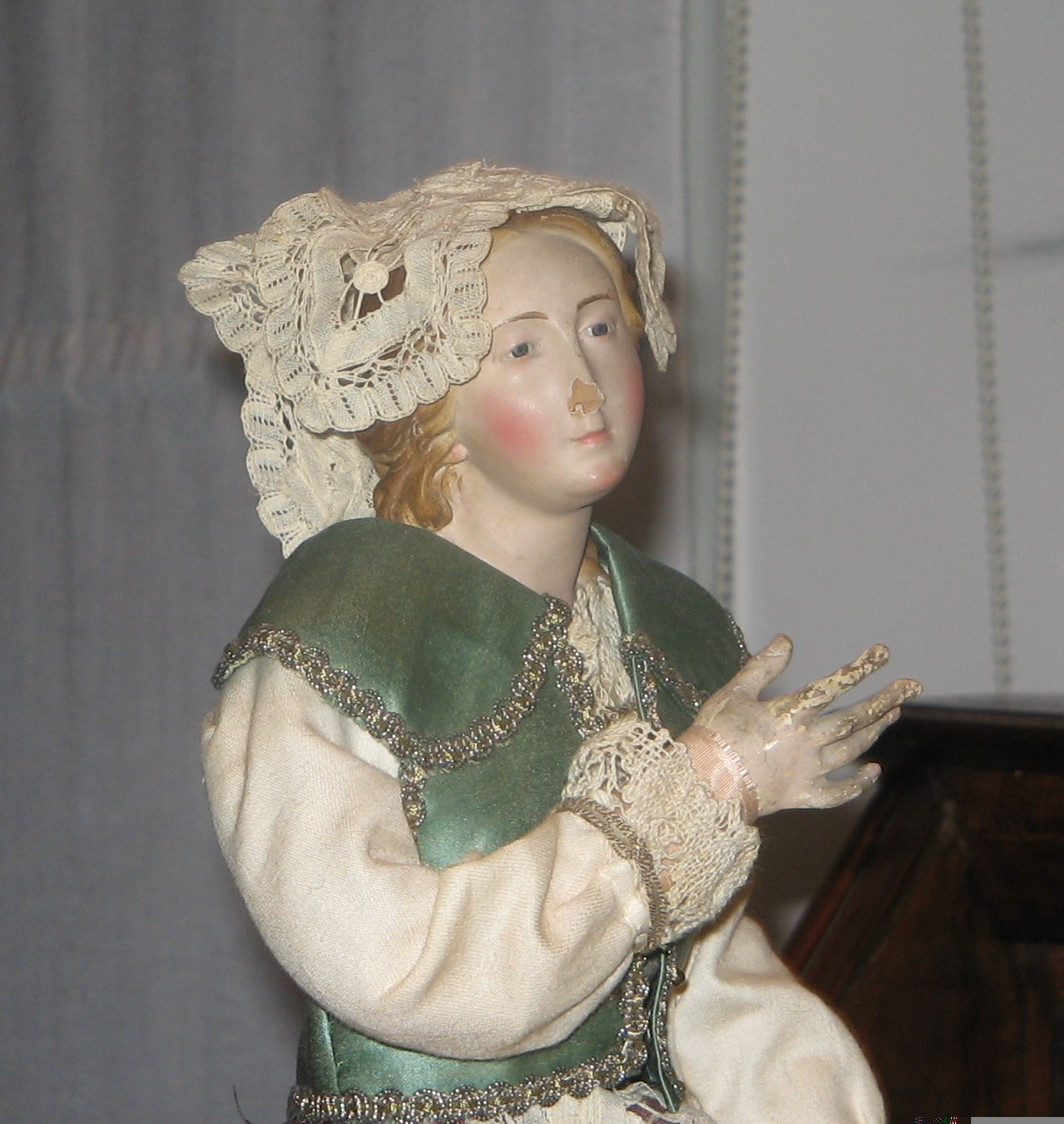 Statuina del presepio napoletano, XIX secolo